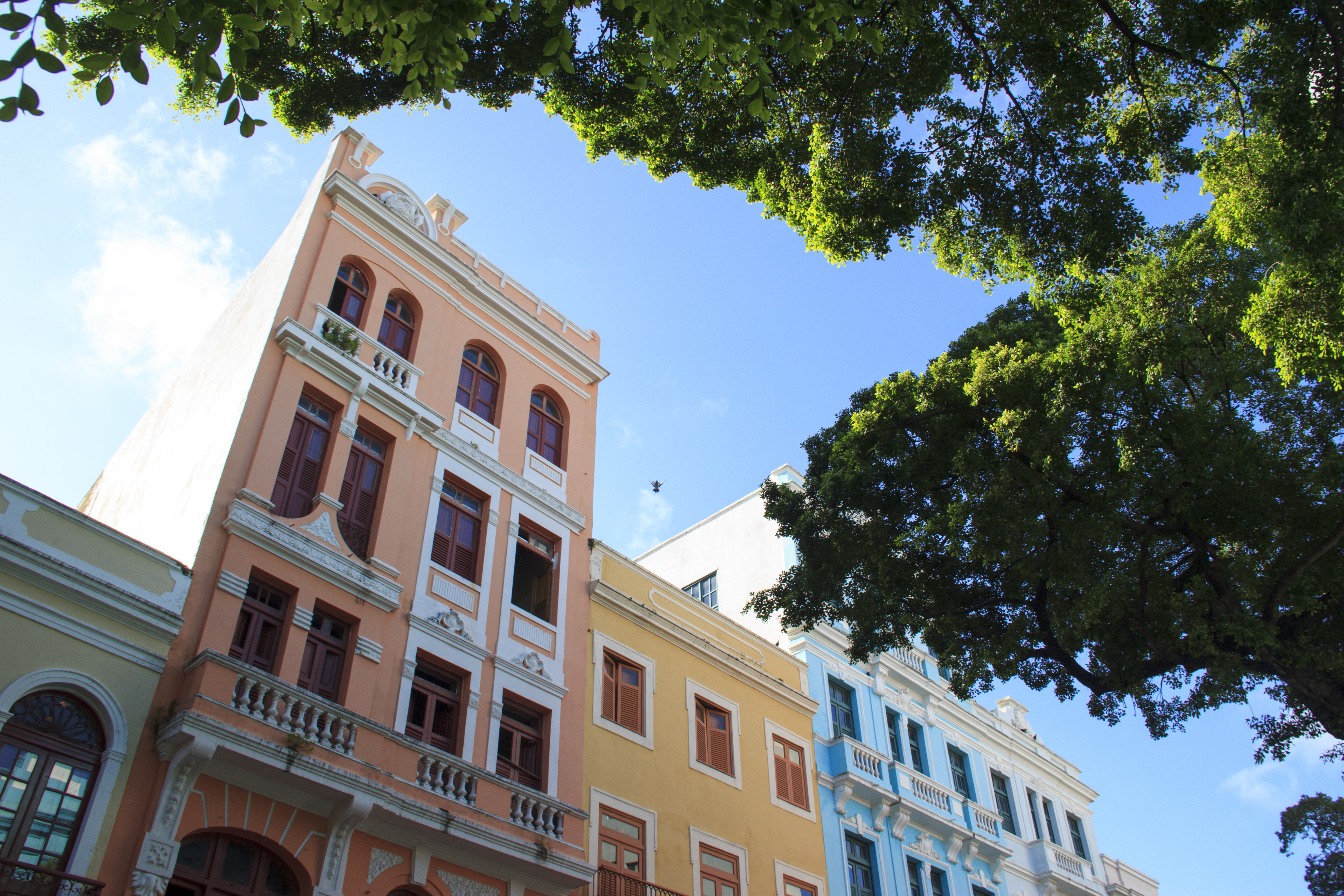 Conjunto Arquitetônico, Urbanístico e Paisagístico do Antigo Bairro do Recife